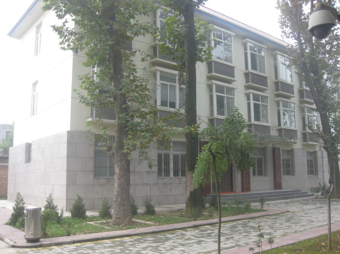 修道院的图书楼